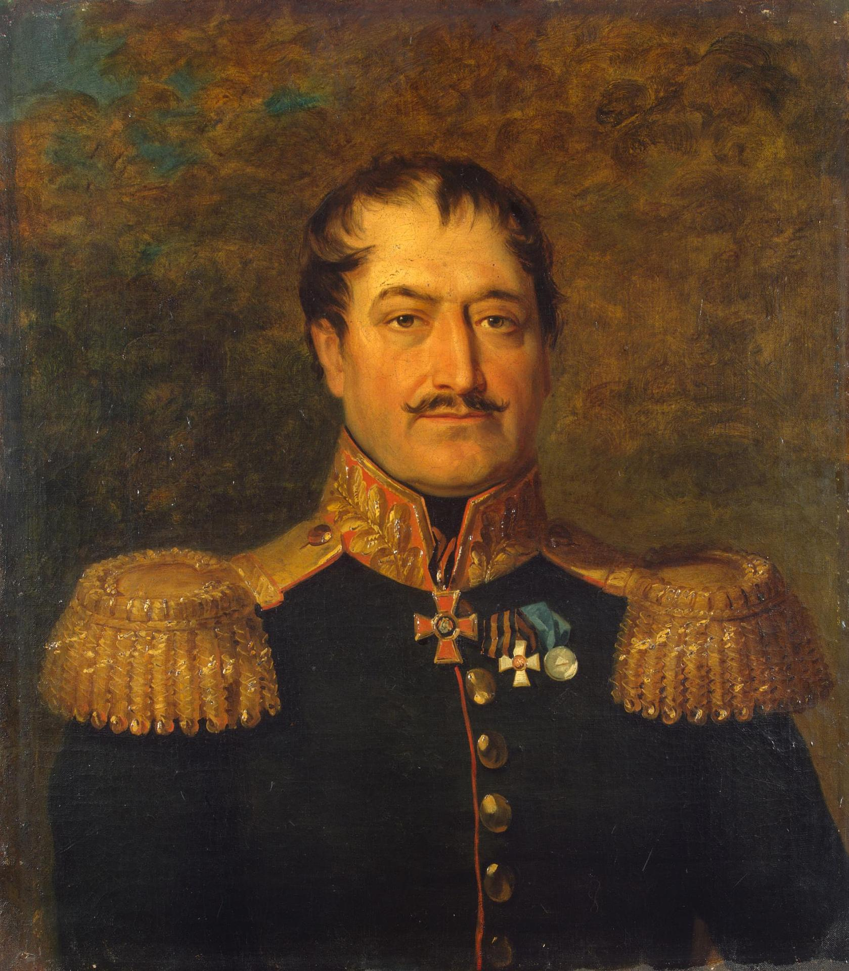 Ivan Semyonovich Zhevakov 1-st (Dzhavahishvily) (1762 – 24.07.1837) russian general